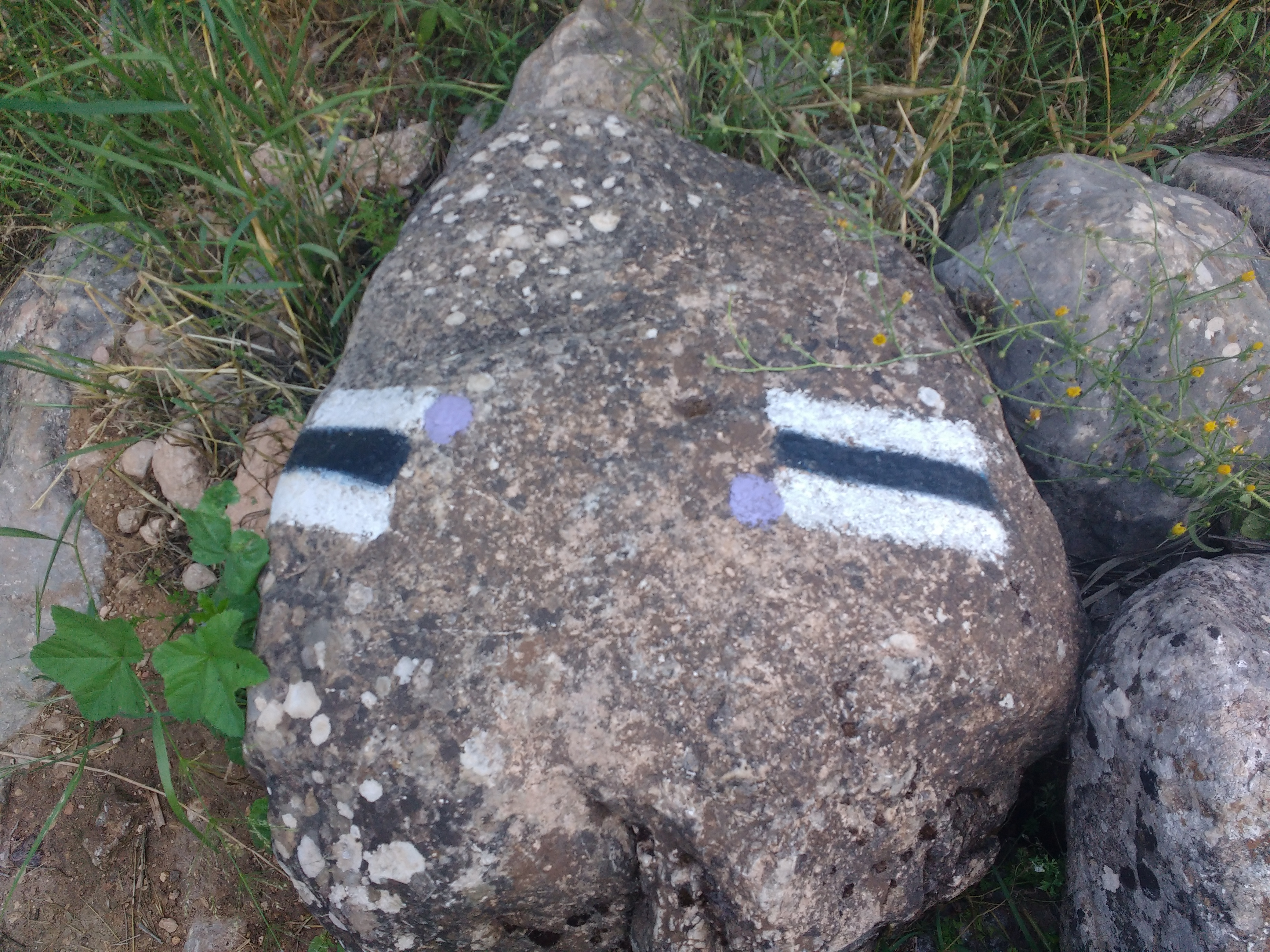 סימון שבילים בשביל מים אל ים. צבע הסימון יכול להשתנות לאורך המסלול, אולם הנקודה הסגולה מלווה אותו לכל אורכו. הסימון סומן בשני צידי הסלע כדי שיהיה אפשר לראות אותו משני כיווני ההליכה.